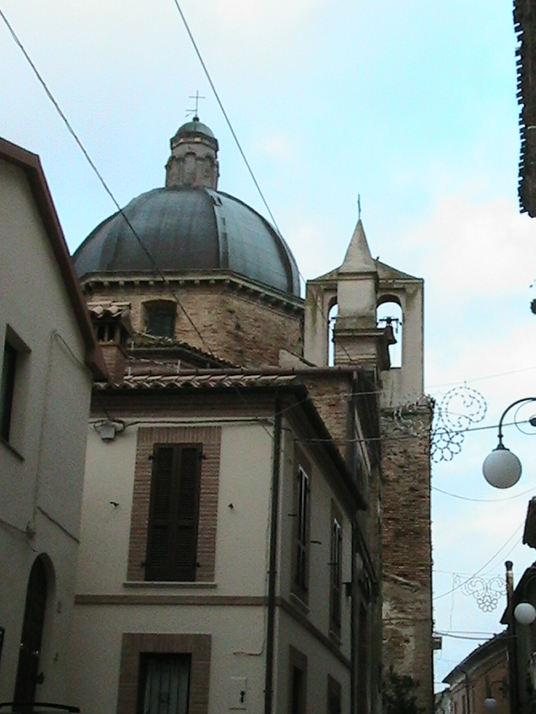 Scorcio